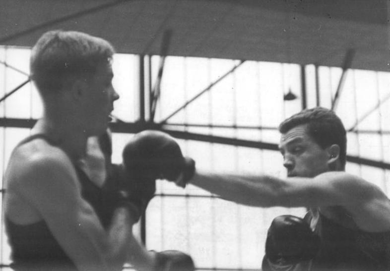 Peter Gerber, Jürgen Schlegel Zentralbild Studré 31.5.1964 Schwerin: Olympia-Ausscheidungskämpfe im Boxen In der Schweriner Sport- und Kongress-Halle wurden am 30.5.64 die ersten fünf Box-Fahrkarten nach Tokio verteilt. Mit Otto Babiasch, Heinz Schulz, Heiko Winter und Jürgen Schlegel qualifizierten sich bereits 4 DDR-Boxer für das olympische Turnier. Den 5. Platz erkämpfte sich der westdeutsche Paul Hogh. UBz: Einen begeistert gefeierten Punktsieg erkämpfte sich der Schweriner Rechtsausleger Jürgen Schlegel (rechts) im abschließenden Halbschwergewichtskampf. Der westdeutsche Peter Gerber fand keine Einstellung und verlor klarer als allgemein erwartet.